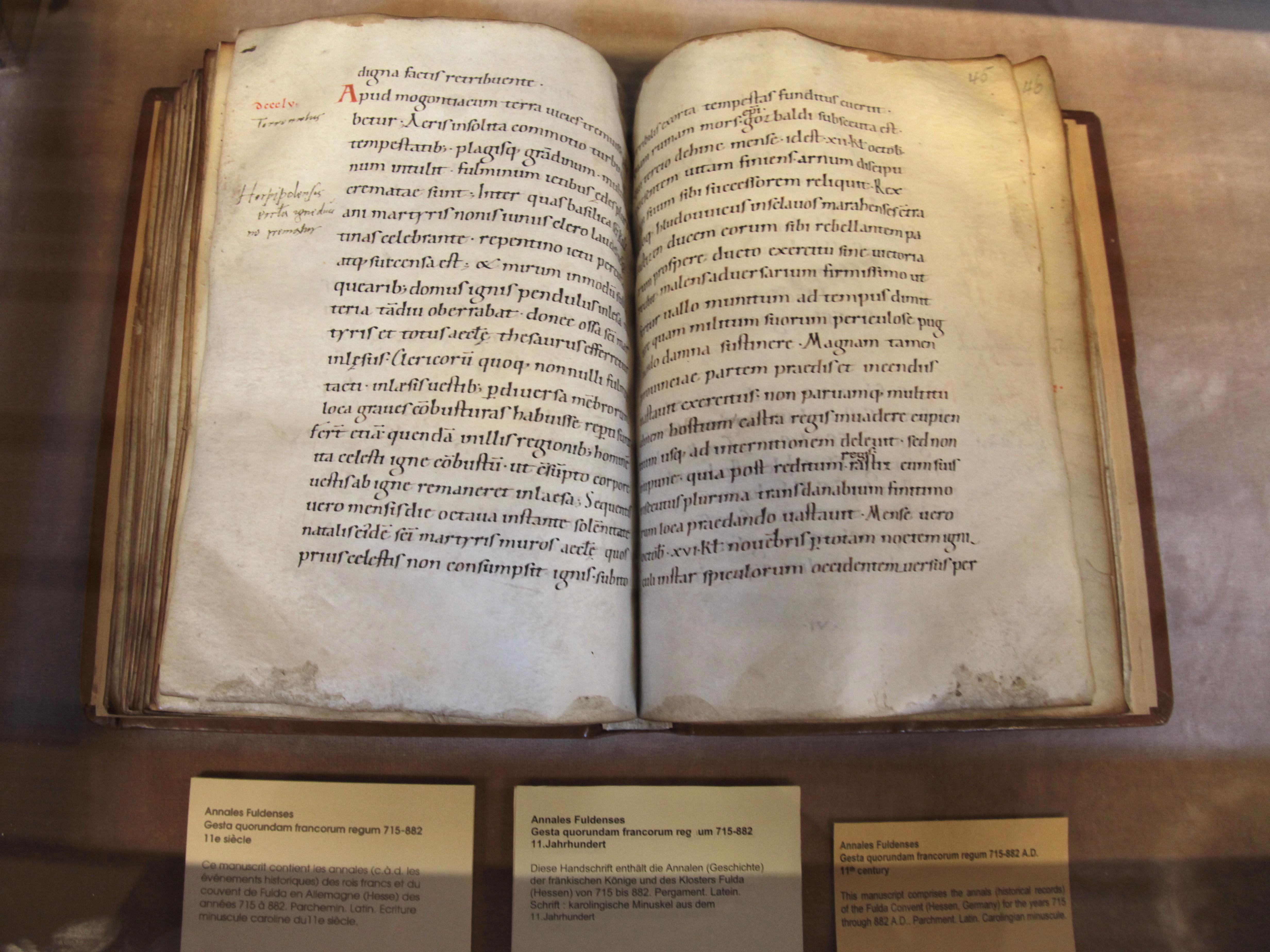 Annales des rois francs et du couvent de Fuida, Allemagne (Hesse) des années 715 à 882. Ecriture minuscule sur parchemin en caroline (11e siècle). Manuscrit du 11e siècle - Manuscript 11 century.